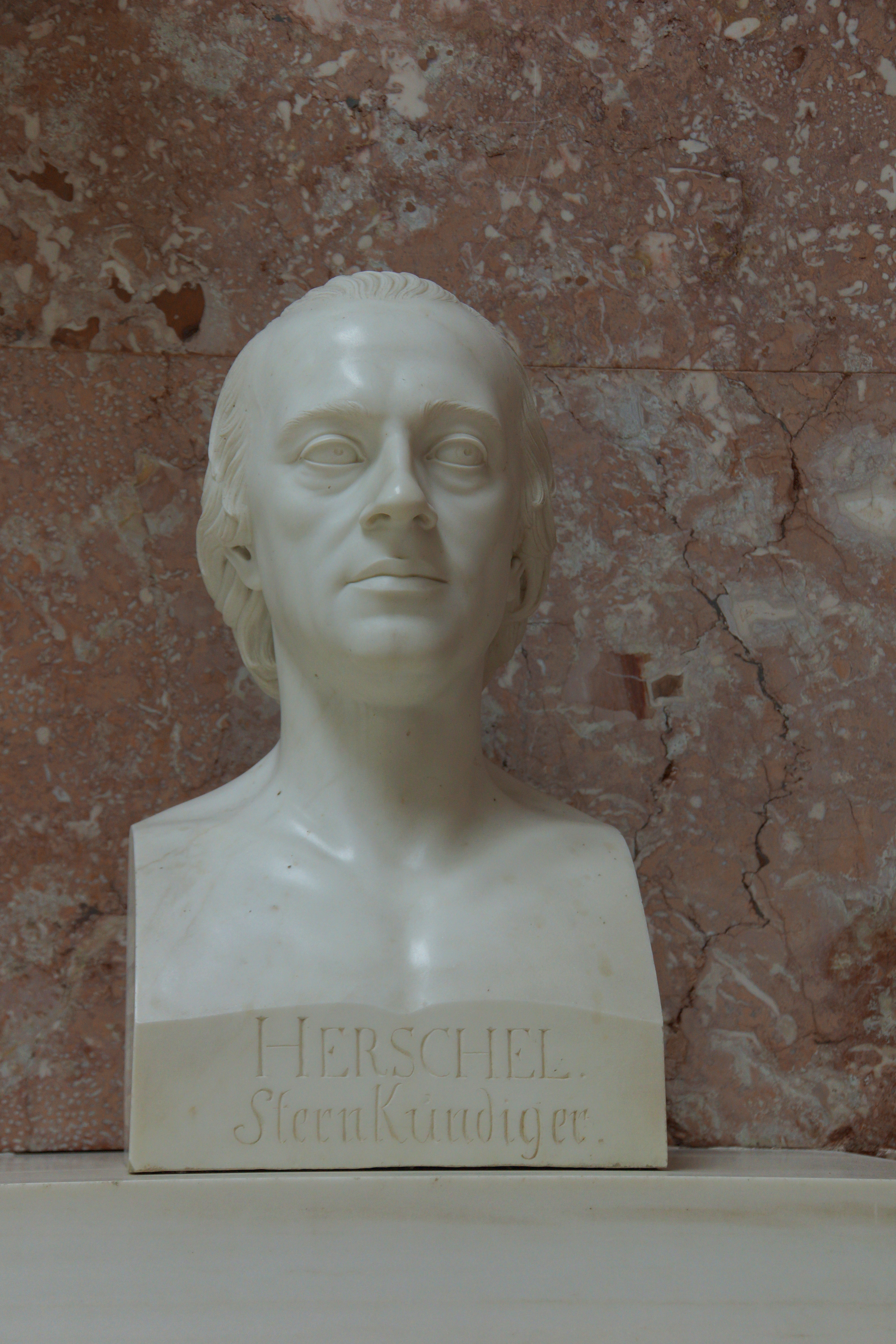 Büsten in der Walhalla: Friedrich Wilhelm Herschel